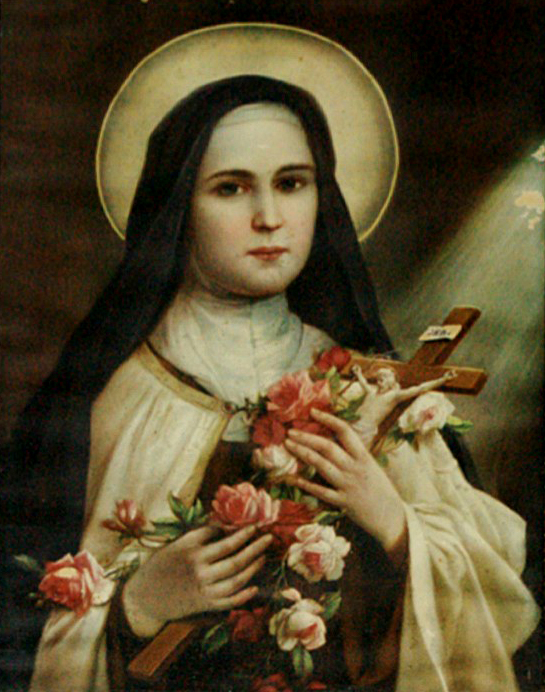 St. Nikolaus Mitteleschenbach, Eingangsbereich: Bildnis von Therese von Lisieux